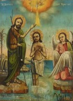 Икона од црквата „Св. Димитриј“ во битолското село Дихово